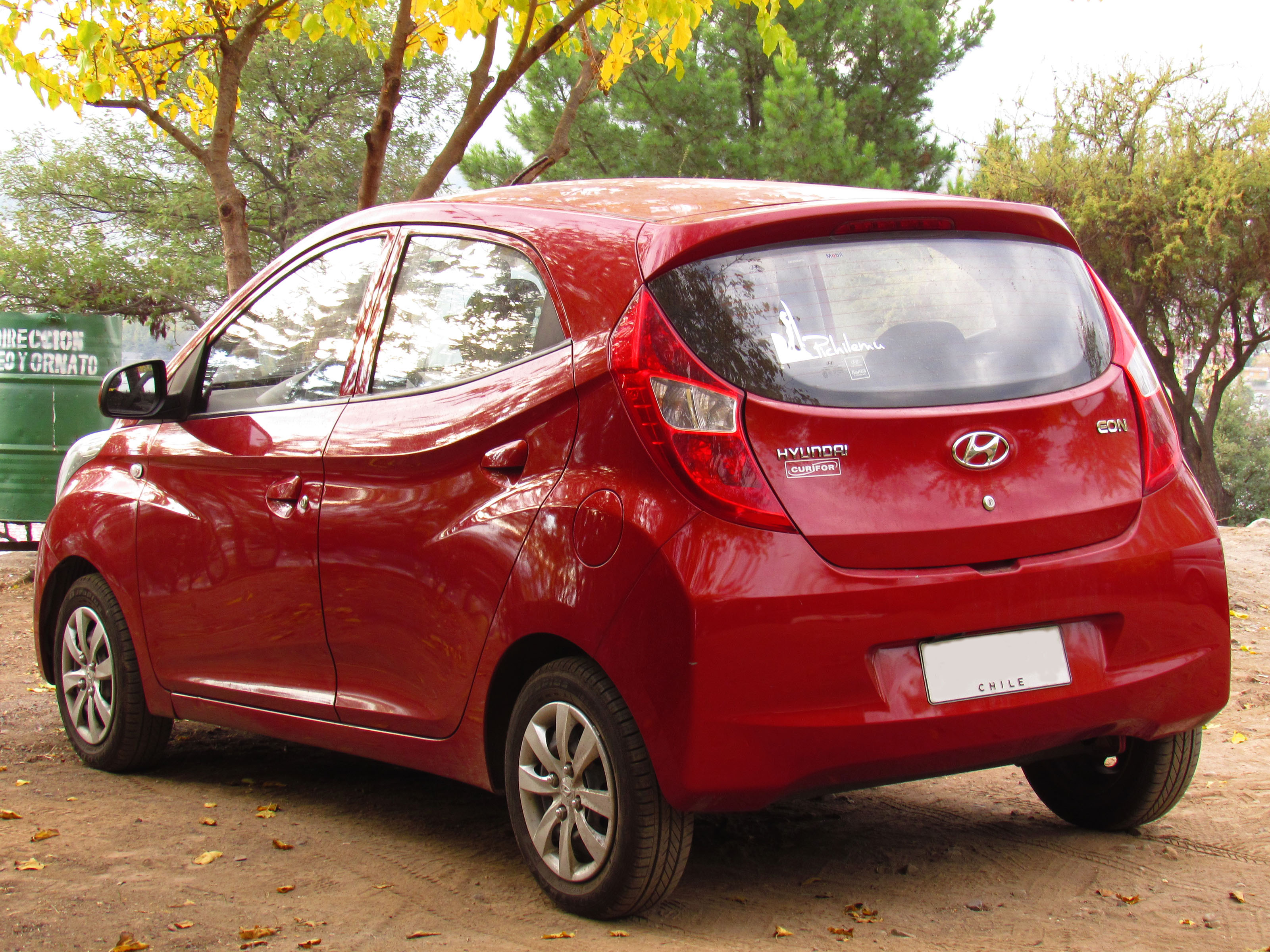 Hyundai Eon GL 2013